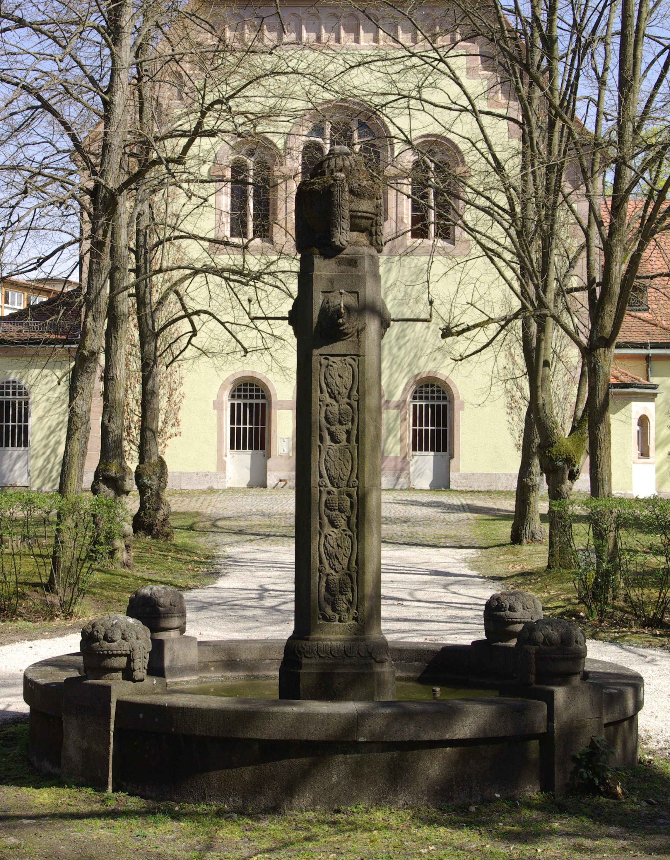 Zierbrunnen (1913) von Philipp Kittler auf dem Neuen Jüdischen Friedhof in Nürnberg